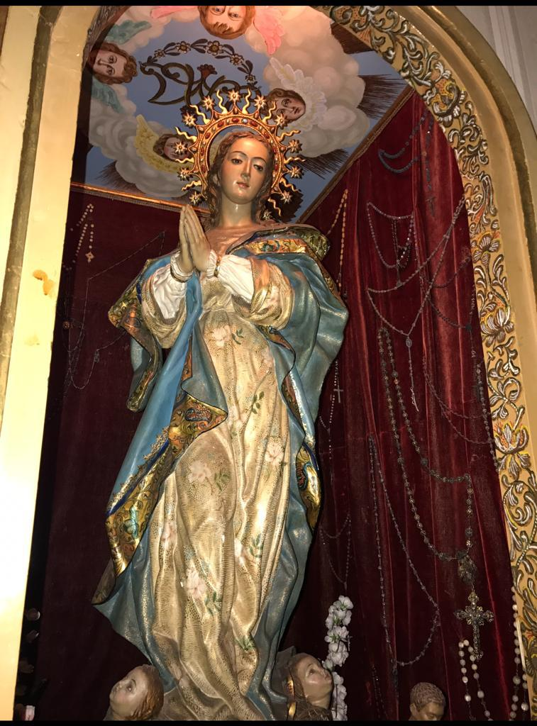 Foto tomada de la colección particular del autor